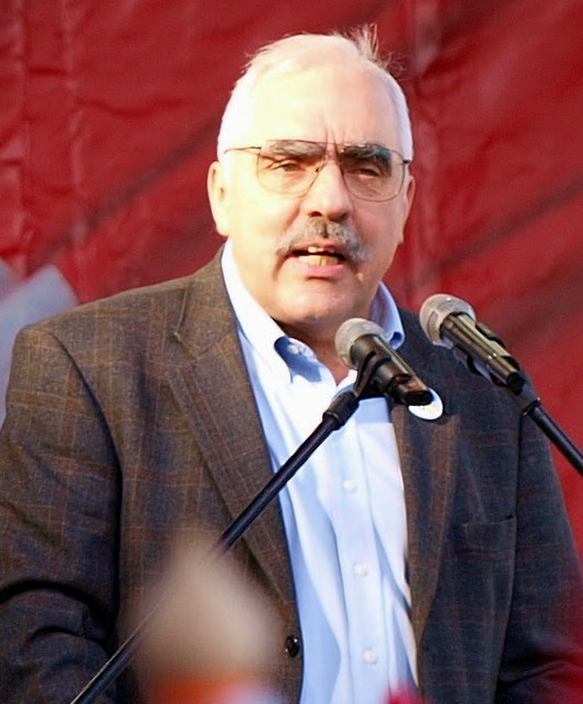 Bokros Lajos, a MoMa elnöke, korábbi pénzügyminiszter beszédet mond az ellenzéki pártok 2013. október 23-i tüntetésén